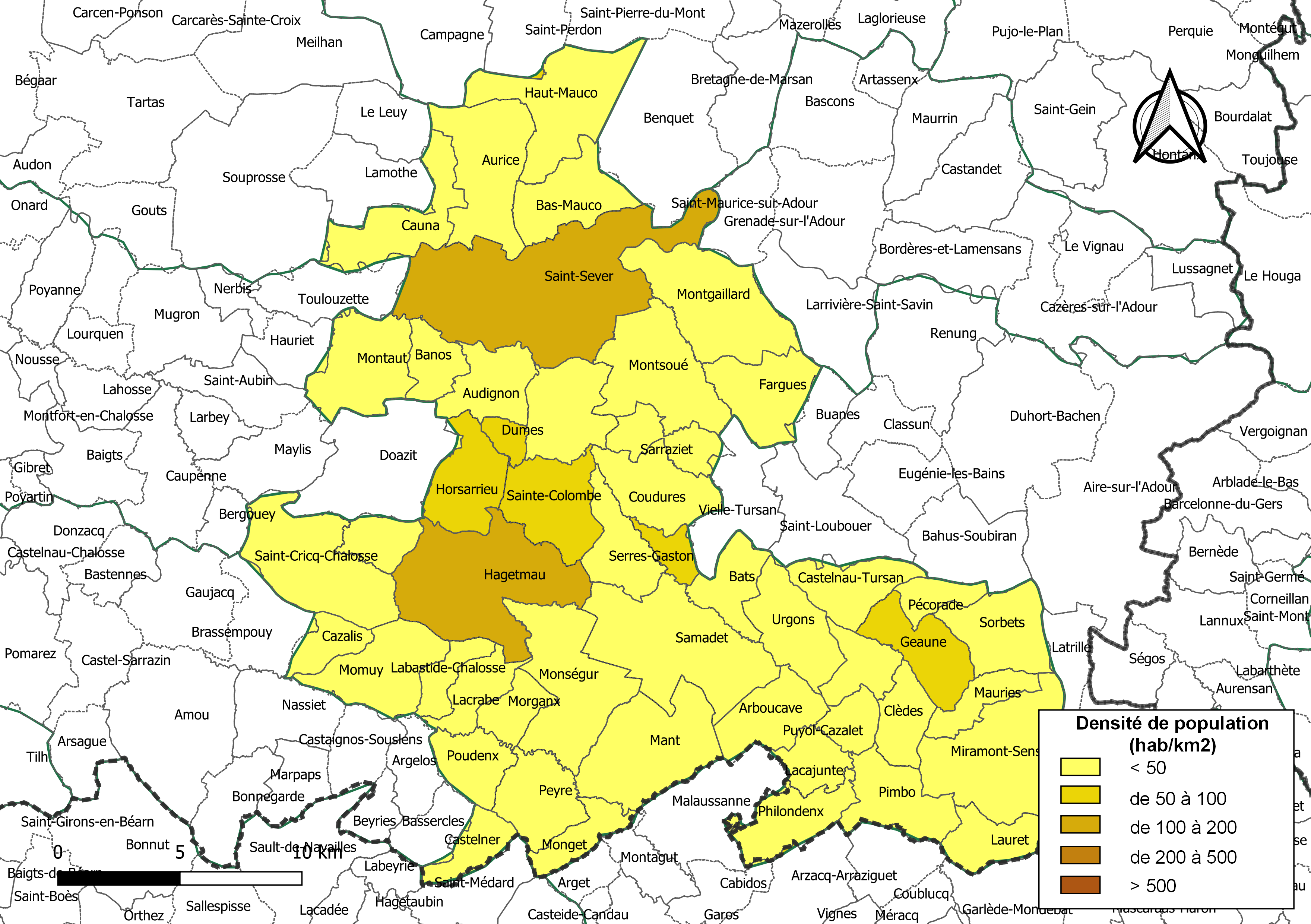 Carte des densités de population (millésimée 2016) des communes de la Communauté de communes Chalosse Tursan, département des Landes, France. Composition au 1er janvier 2019.